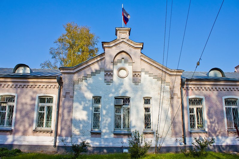 Ныне в здании располагается военкомат Хабаровского края